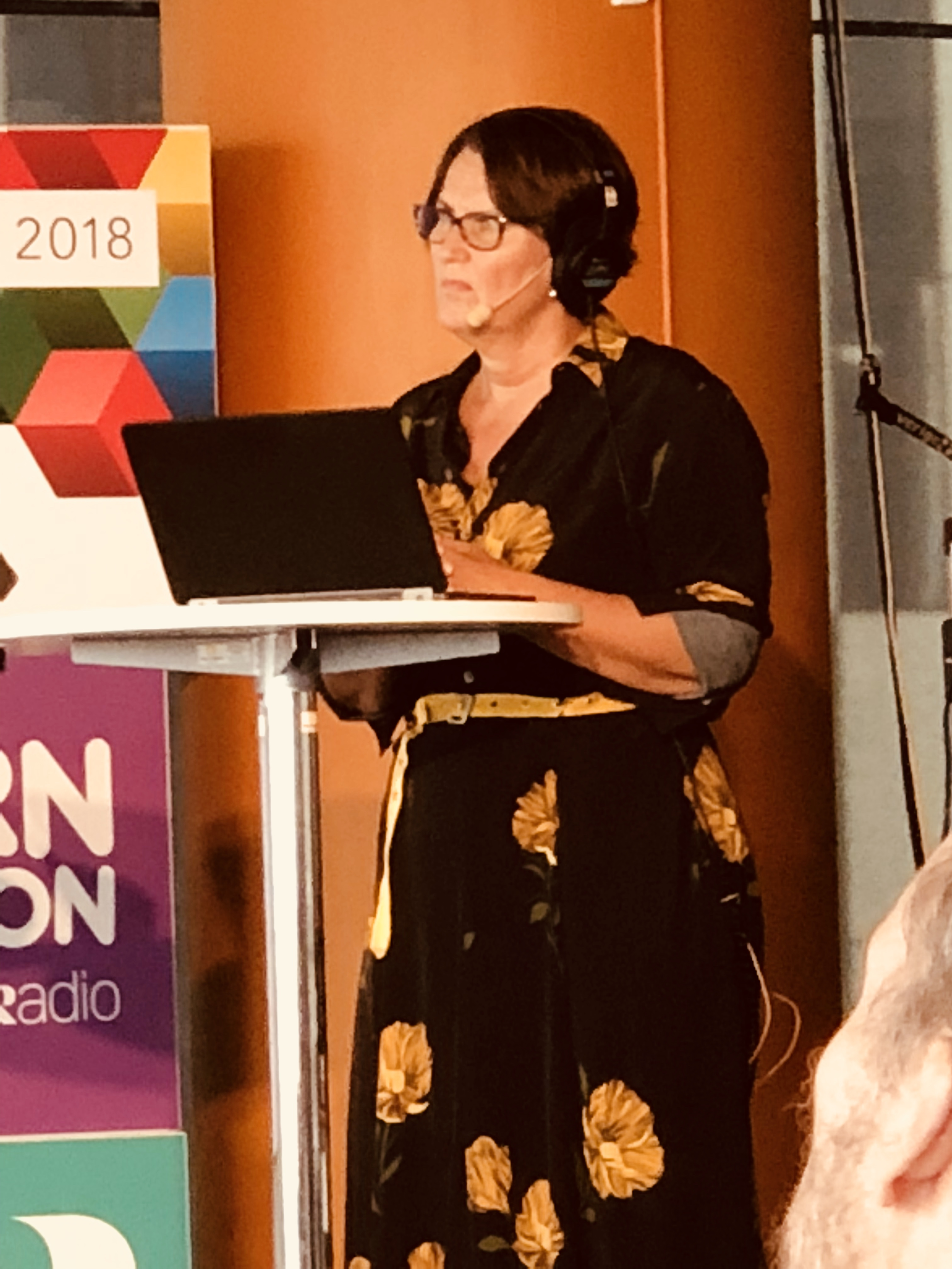 Monica Saarinen under en liveinspelning av Ekots lördagsintervju i Kulturhuset, Stockholm.